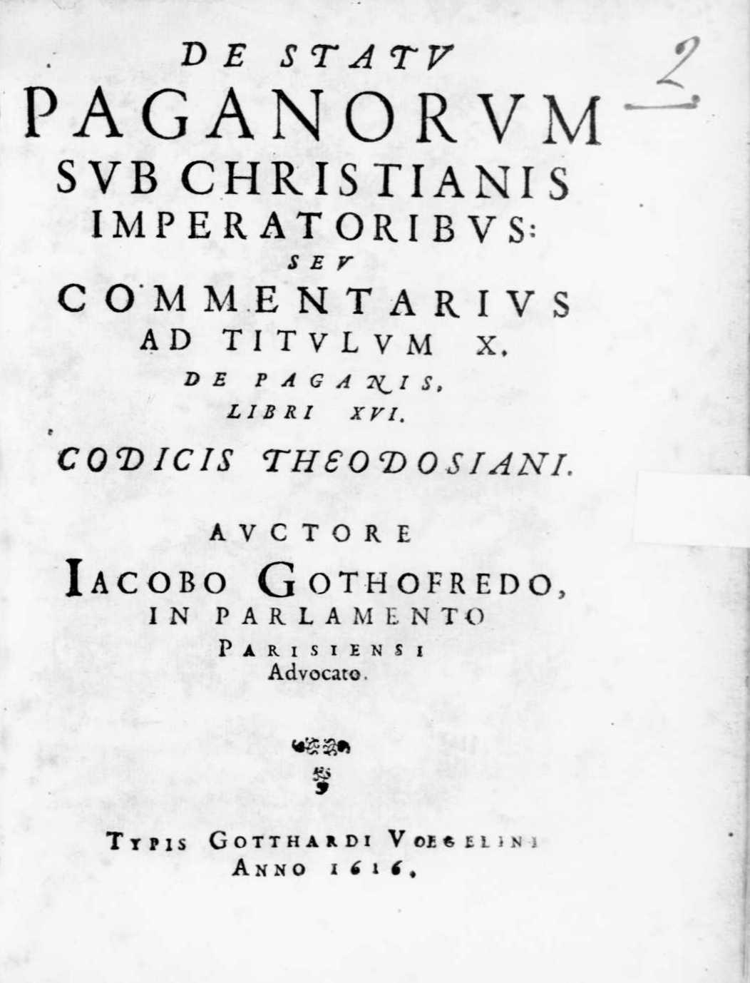 Frontespizio